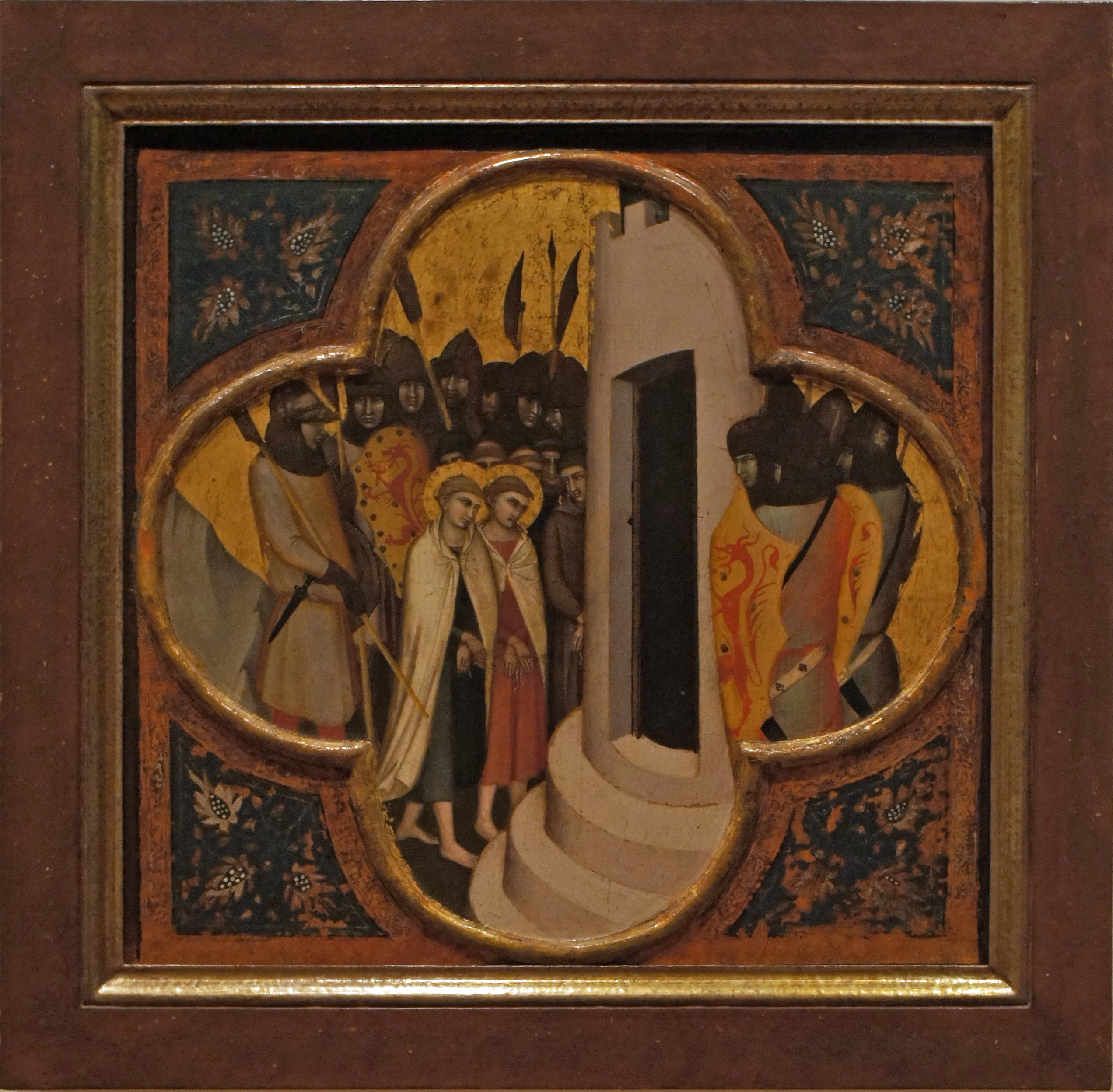 Oeuvre de Mello_da_Gubbio_martyr_de_Jacques_et_Marien.